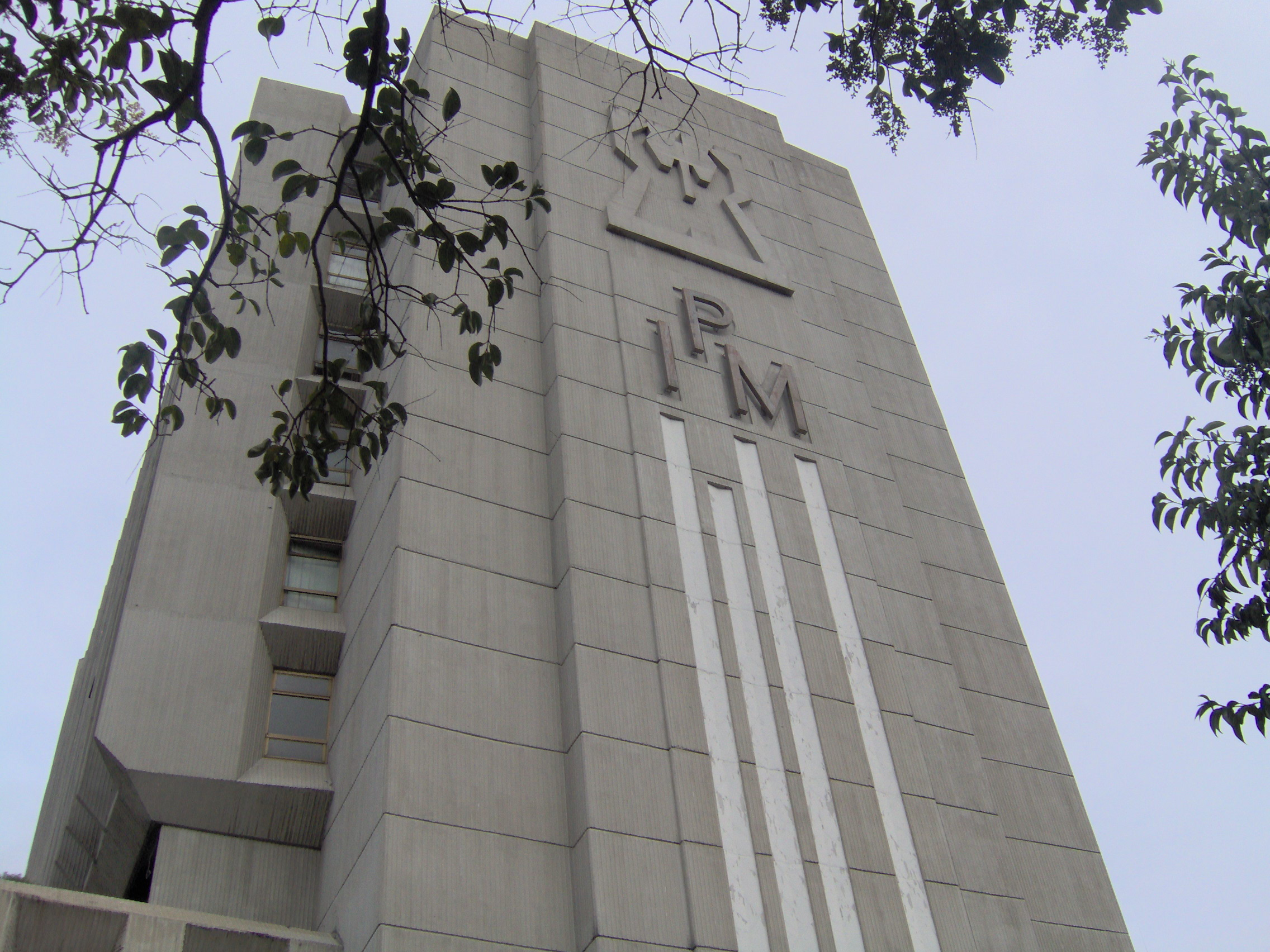 Edificio IPM, Centro Histórico, Zona 1, Ciudad de Guatemala. La sede de CONAP se encuentra al 5°, 6° y 7° Nivel